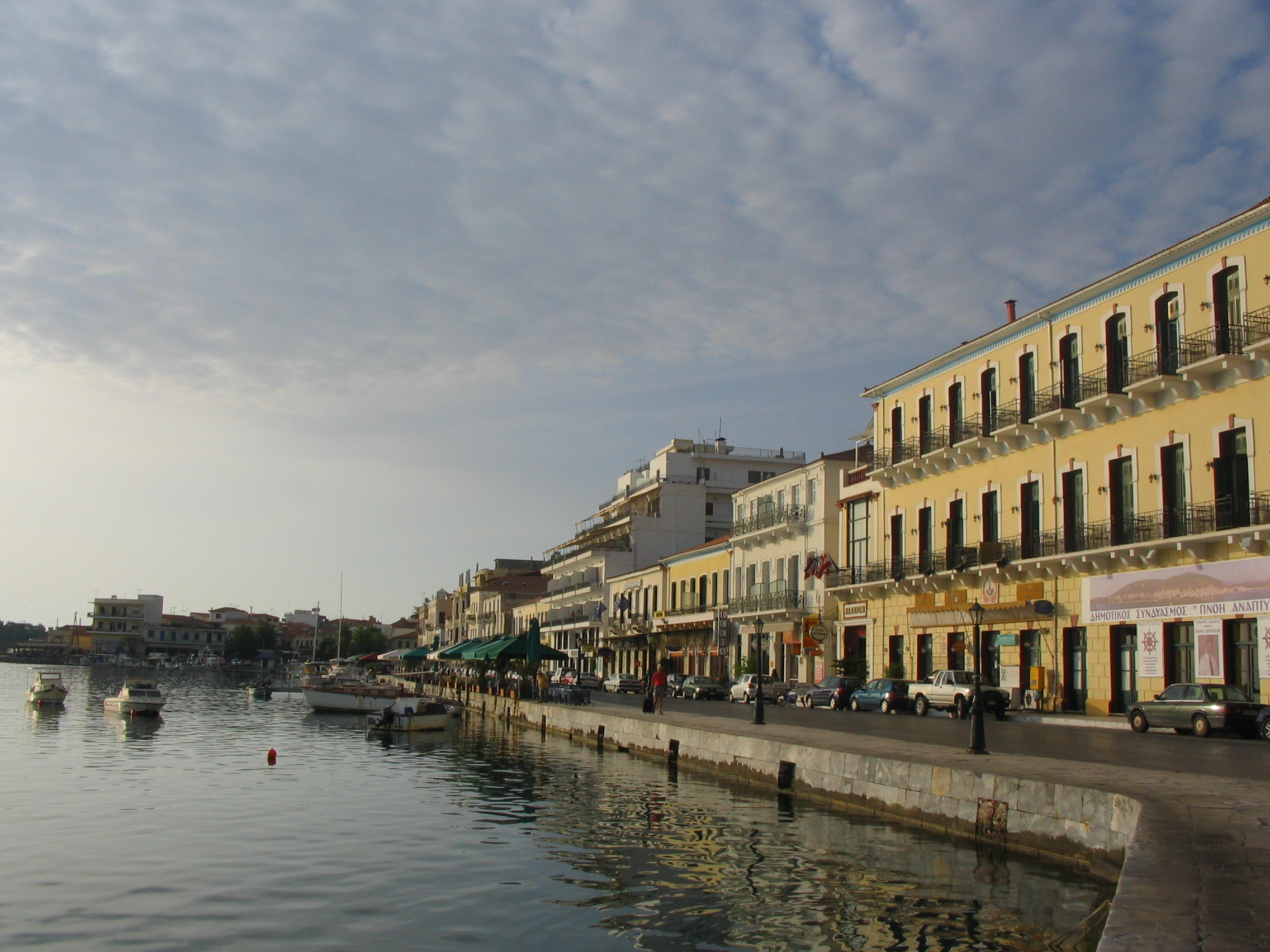 Набережная города Гифио/Гифион, Пелопонесс, Греция